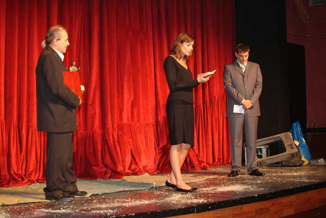 Moja fotografija.